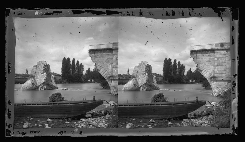 Pont sur l'Ariège à Pinsaguel (Haute-Garonne). Juin 1875. Vue d'ensemble du pont détruit par l'inondation des 23 et 24 juin. Au premier plan canot échoué ; au second plan à gauche pilier seul, à droite arc brisé ; en arrière plan sur l'autre rive façade de maison, arbres.